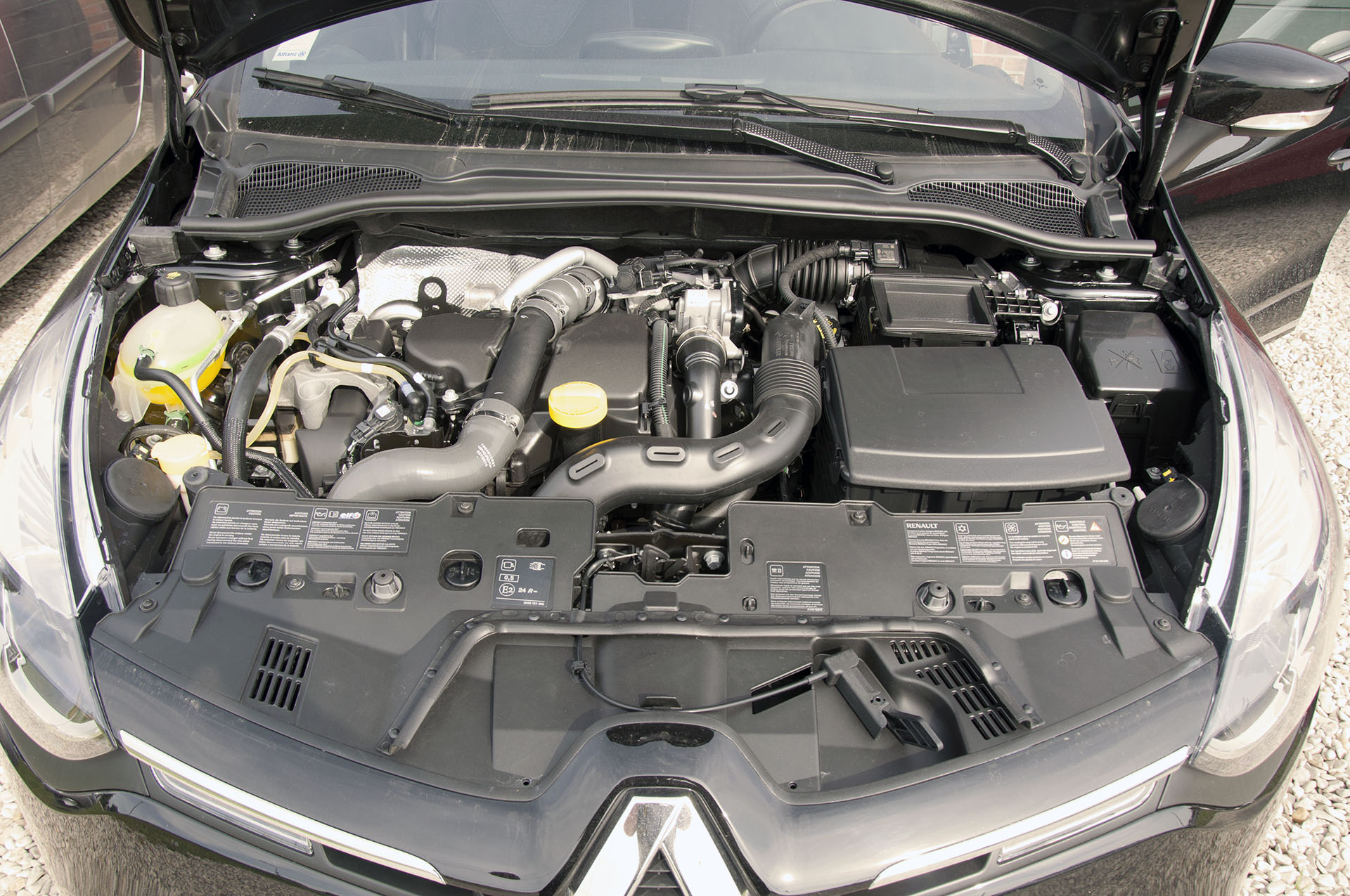 Moteur sur une Renault Clio 4 1.5 DCI 90